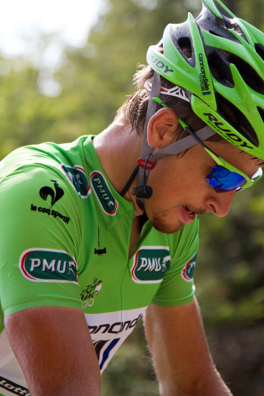 124 sagan